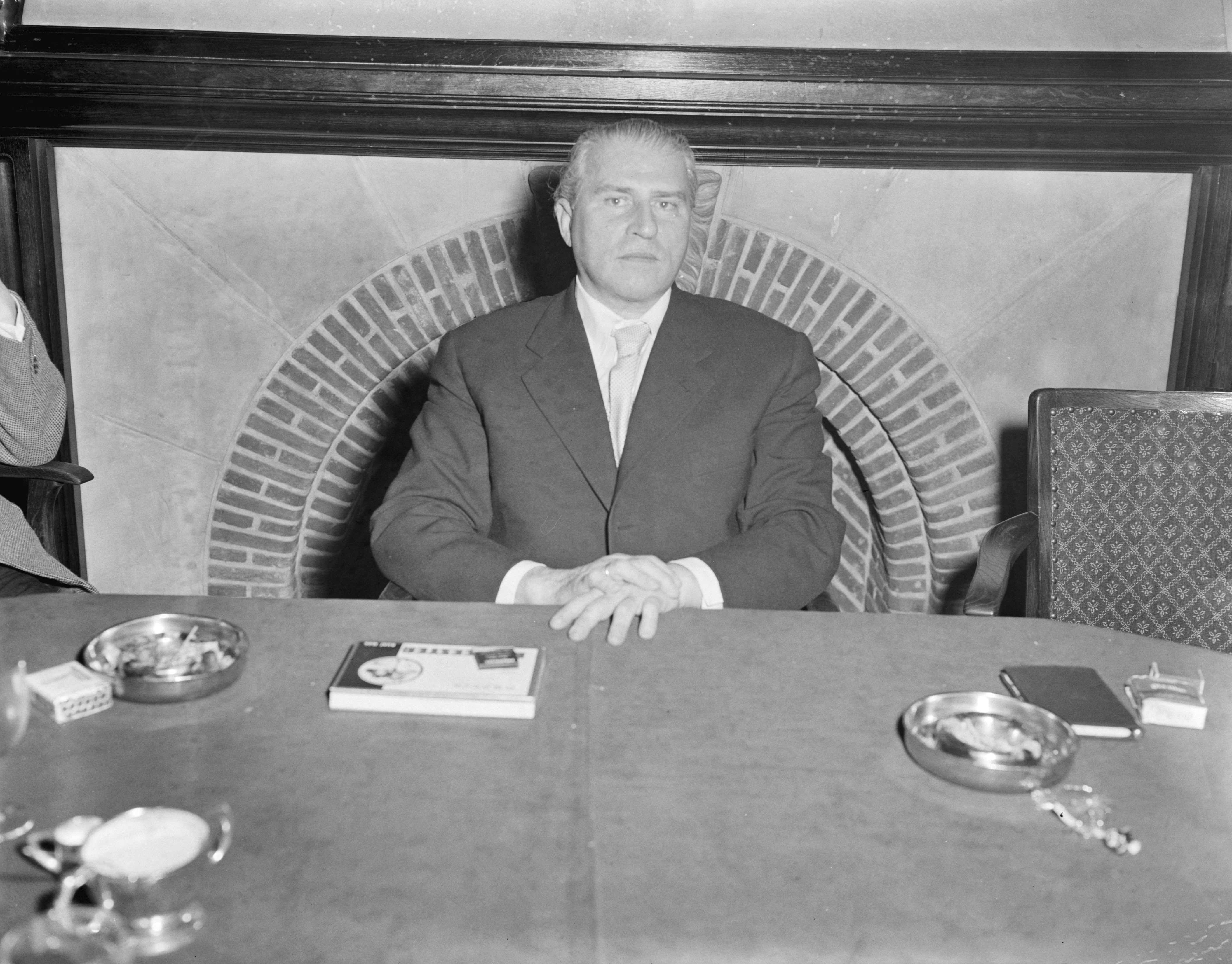 Collectie / Archief : Fotocollectie Anefo Reportage / Serie : [ onbekend ] Beschrijving : Duitse auteur Carl Zuckmayer bezoekt Amsterdam Datum : 8 maart 1956 Locatie : Amsterdam, Noord-Holland Trefwoorden : auteurs, letterkundigen, schrijvers Persoonsnaam : Zuckmayer, Carl Fotograaf : Pot, Harry / Anefo Auteursrechthebbende : Nationaal Archief Materiaalsoort : Negatief (zwart/wit) Nummer archiefinventaris : bekijk toegang 2.24.01.04 Bestanddeelnummer : 907-6318